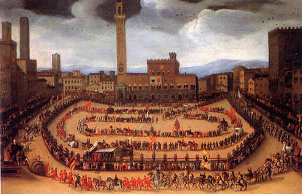 Le défilé des Contrade du 15 août 1546.